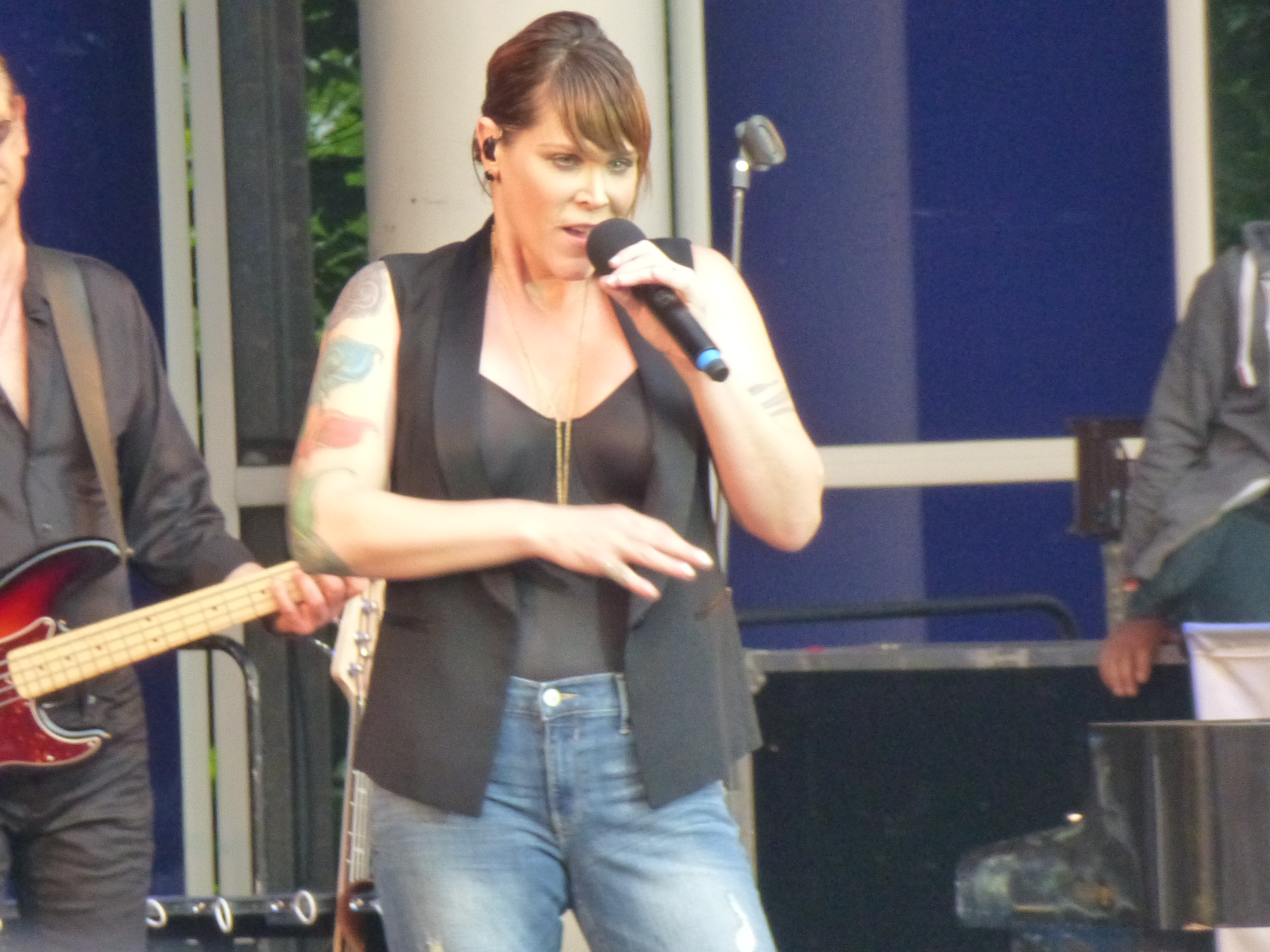 Beth Hart i Tivoli Friheden Aarhus 24 juni 2016